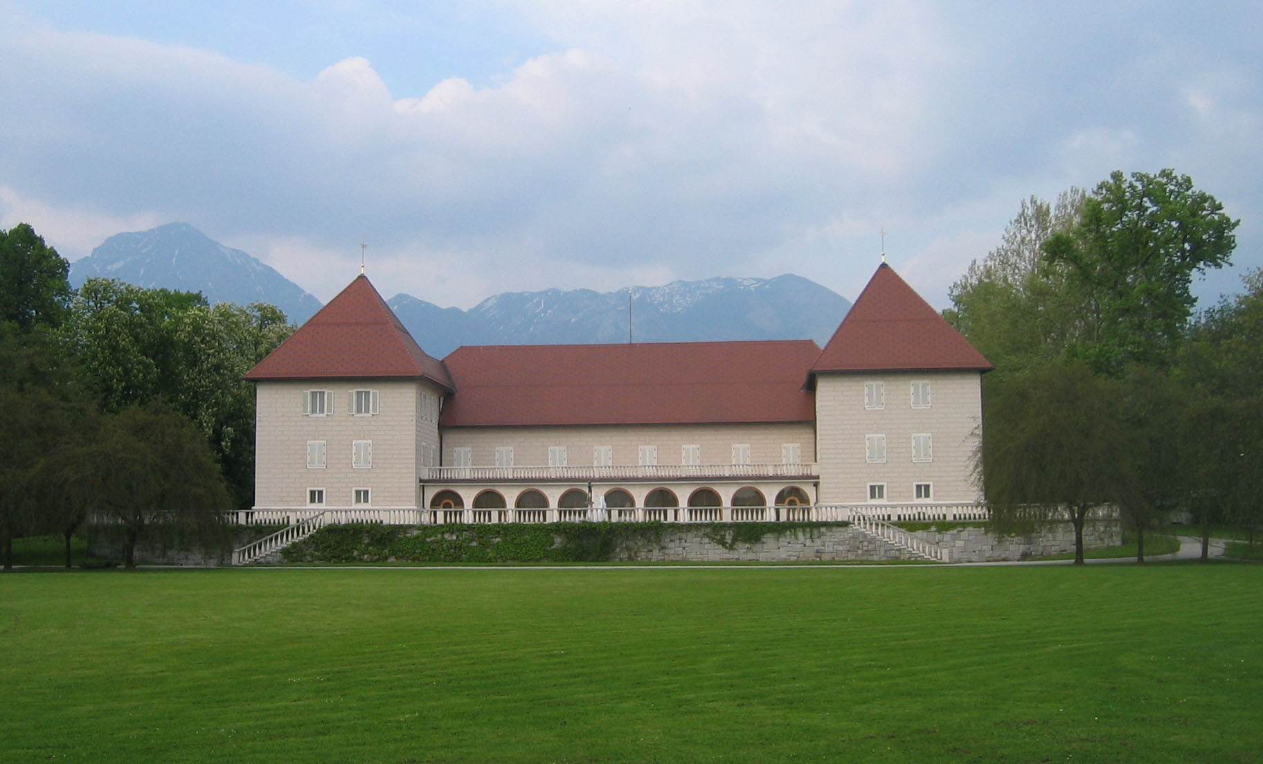 Brdo pri Kranju castle, Slovenia photo:Ziga 08:54, 8 April 2007 (UTC)